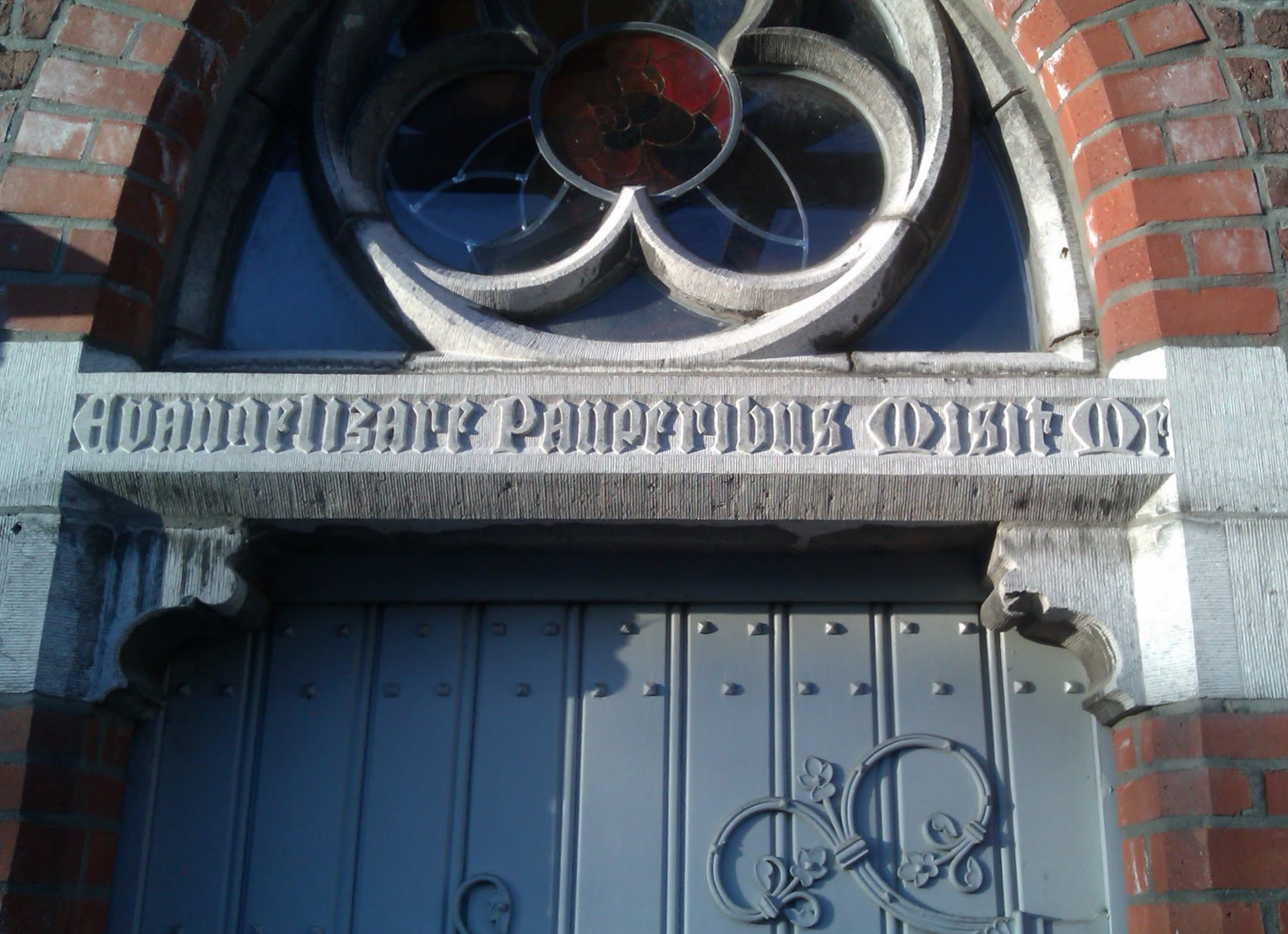 Detail van de toegangspoort van het voormalig klooster met het motto van de paters Oblaten: Evangelizare Pauperibus Misit Me.